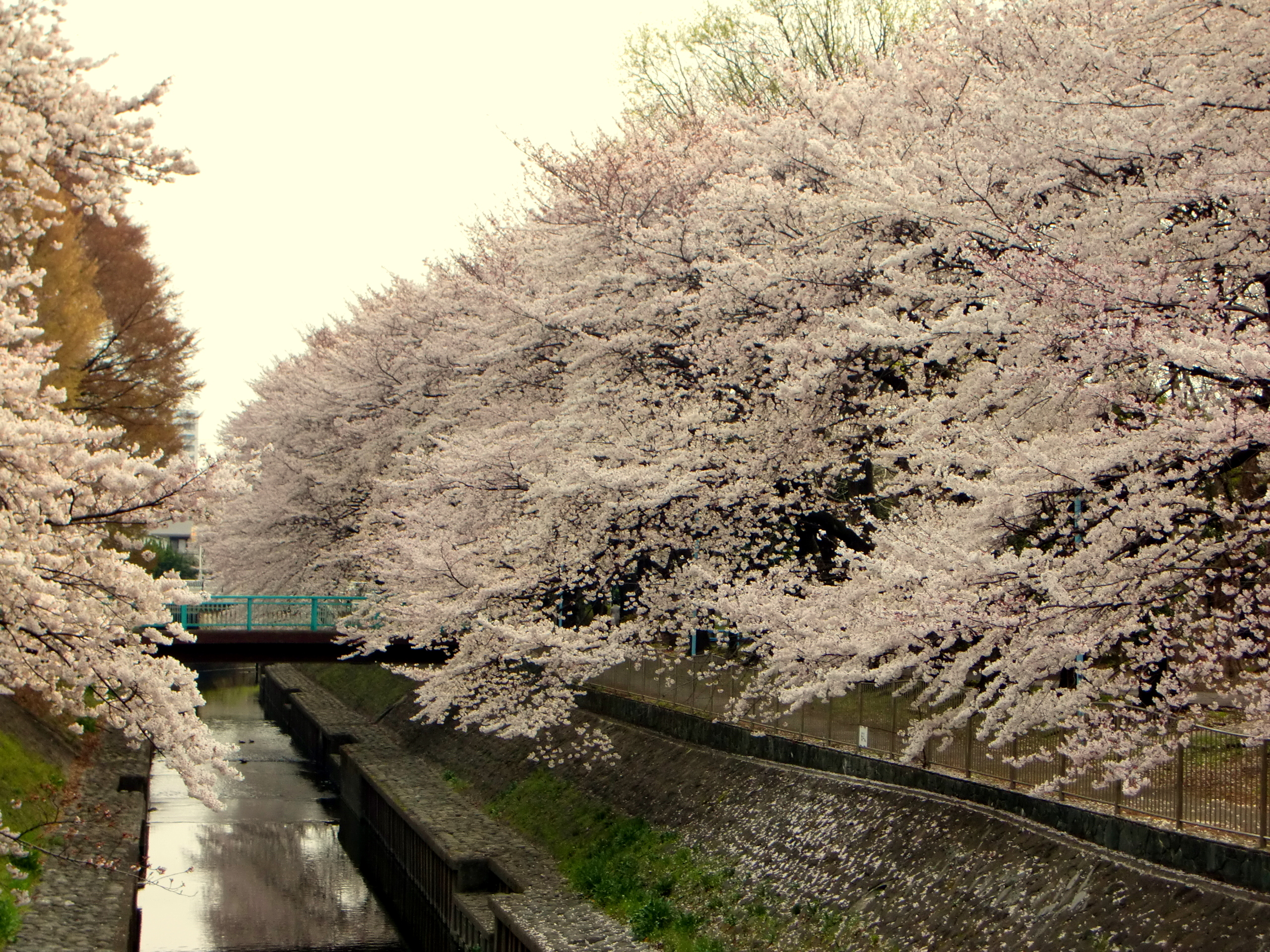 Cherry Blossom and river at Wadabori Koen Park in Suginami, Tokyo Japan